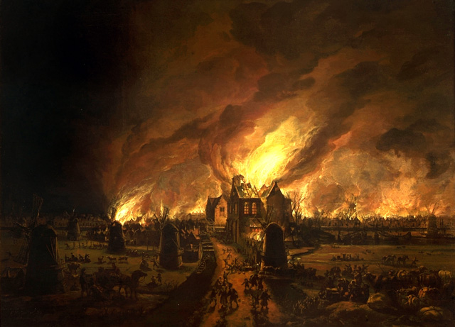 Dit schilderij werd in 1662 door Egbert van der Poel gemaakt.